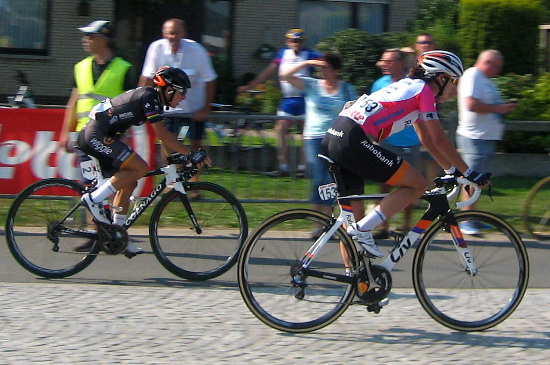 Finish van de 2e etappe van de Lotto Belgium Tour 2016 in Lierde.